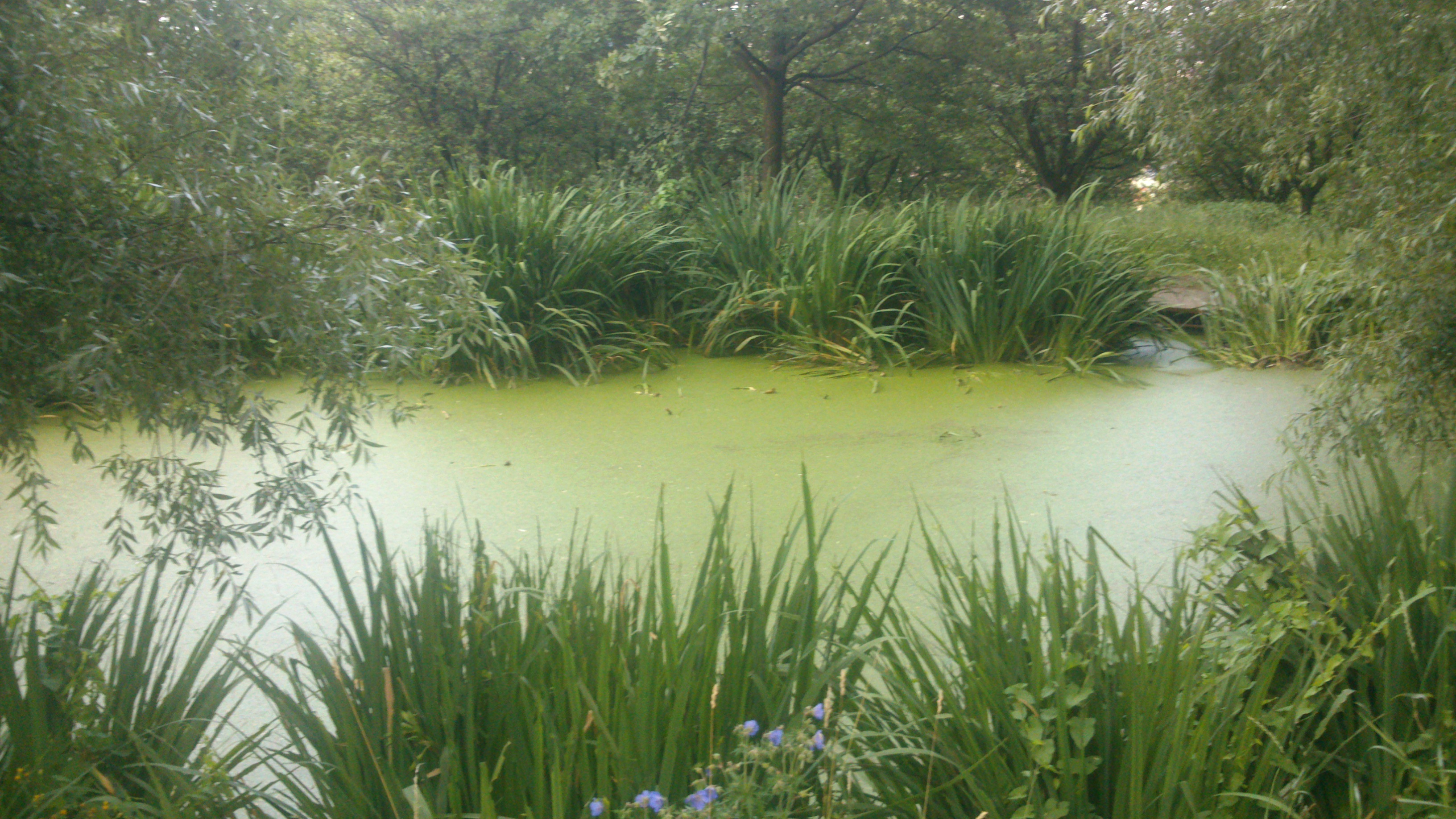 Jezírko u památné babyky na Petříně